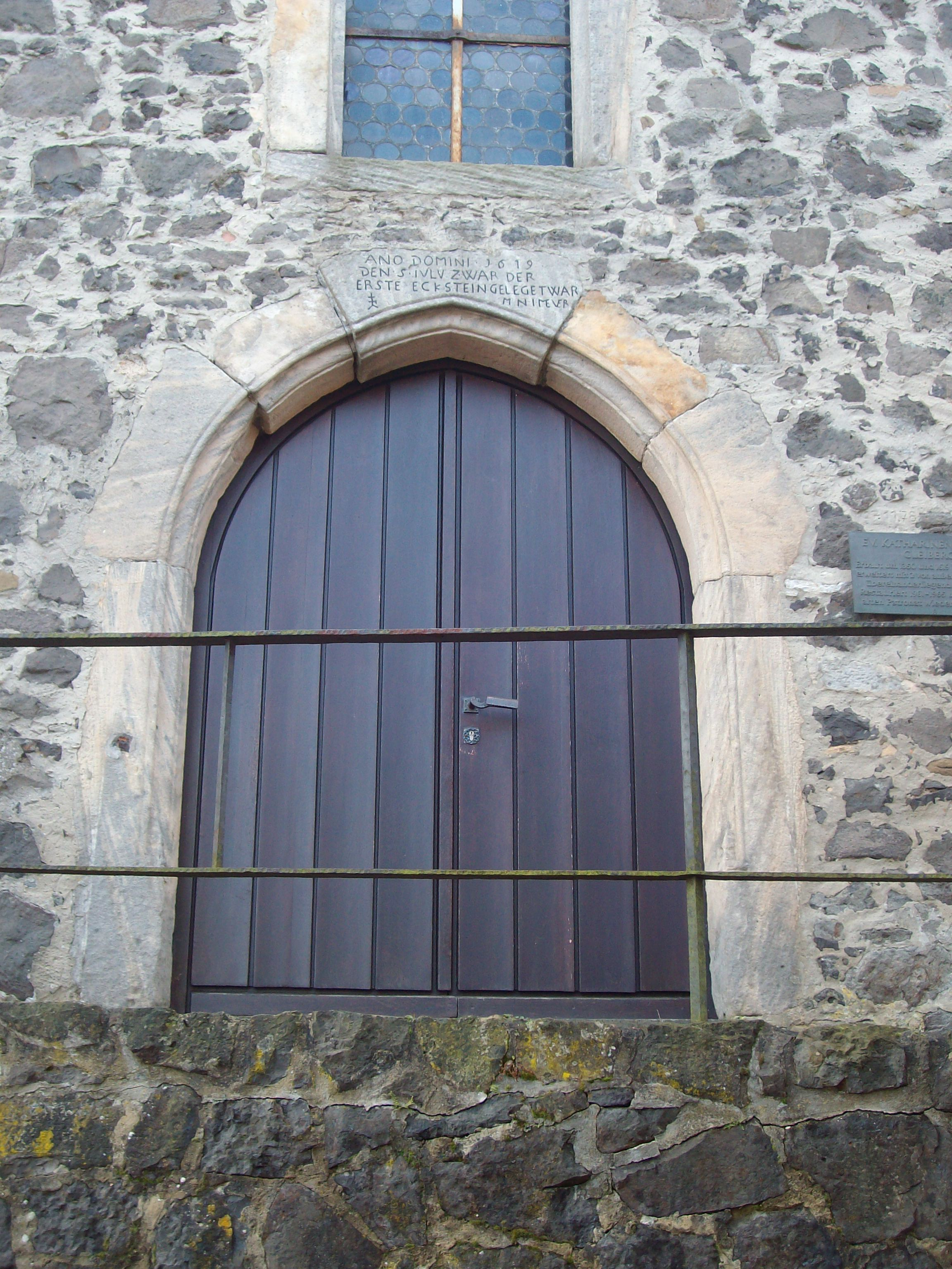 Nordportal der Evangelischen Katharinenkirche Gleiberg, Landkreis Gießen, Hessen, Deutschland